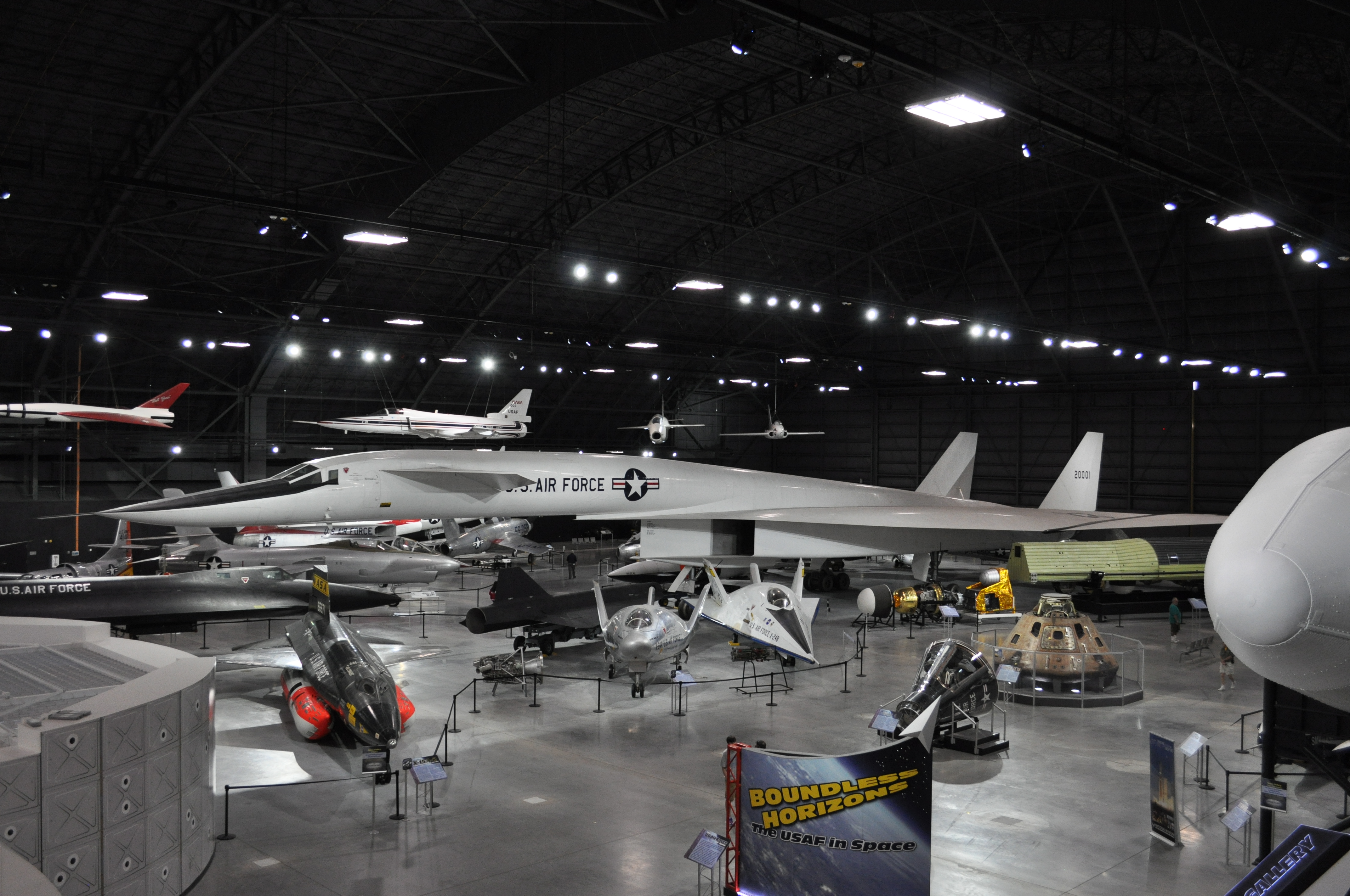 MSN 1 XB-70 VALKYRIE USAF USAF MUSEUM DAYTON